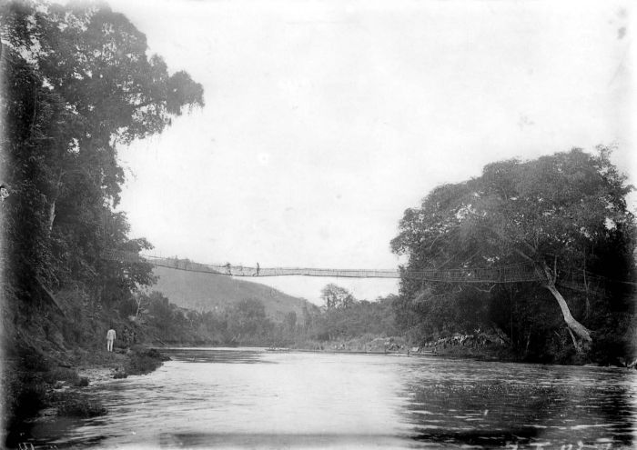 Repronegatief. Rotanbrug over de rivier Poedjoengan in Boeloengan, Borneo